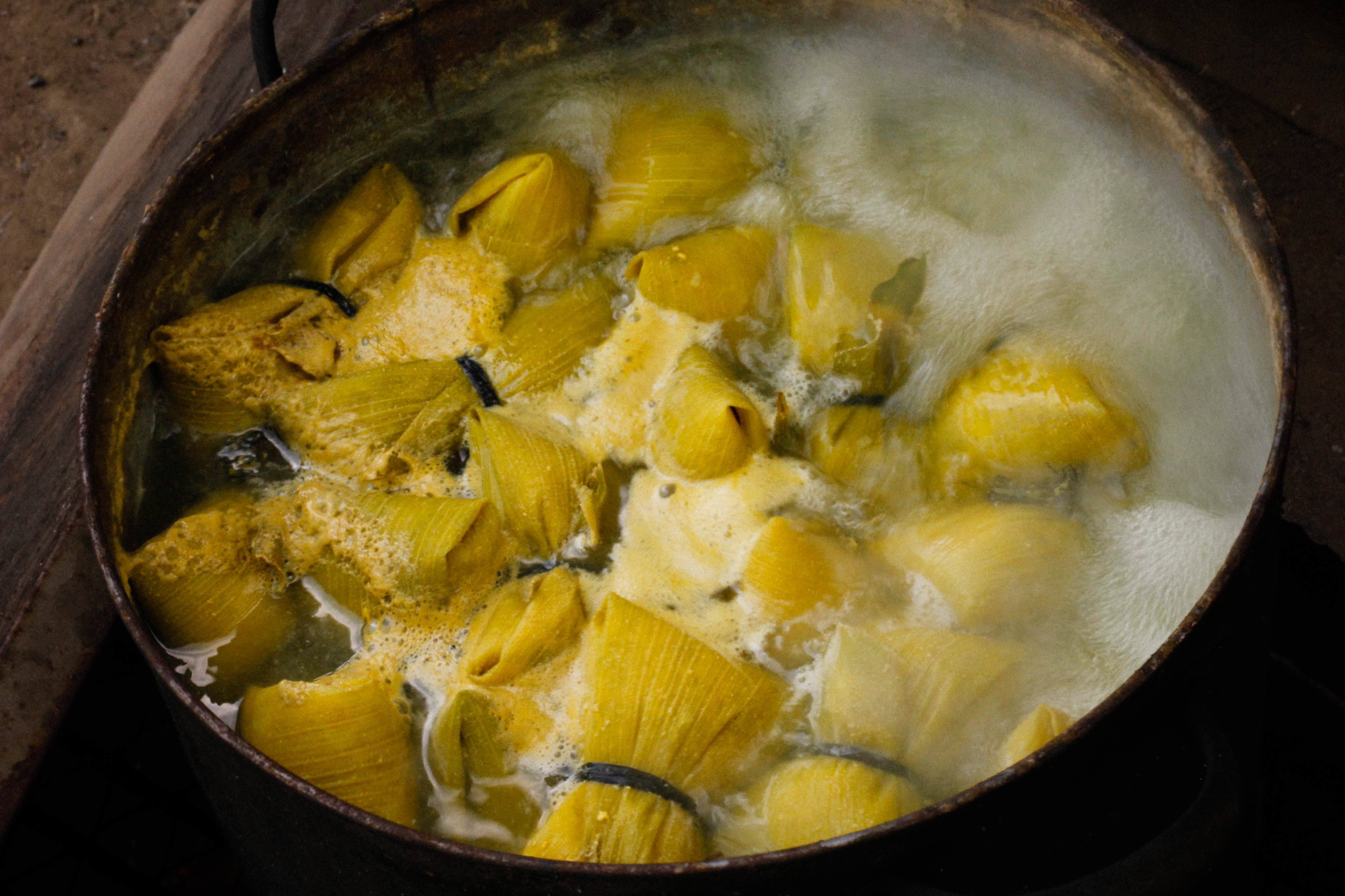 Humas